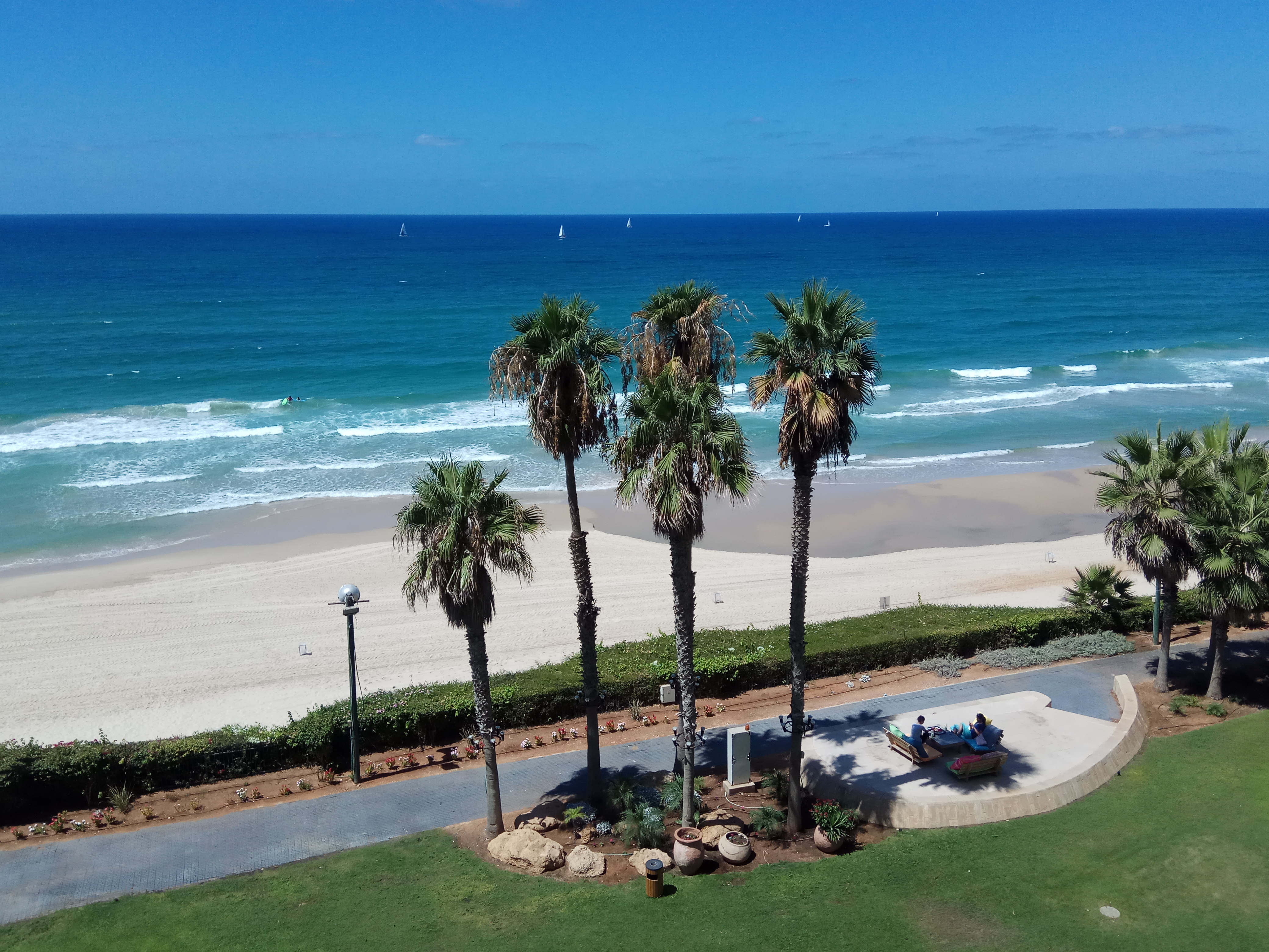 חוף הרצליה - צילום ממלון דניאל